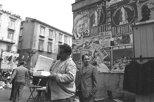 Elezioni amministrative a Napoli. Via Foria.